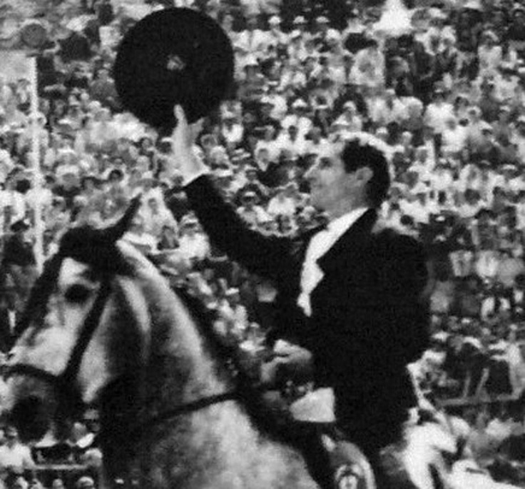 Ángel Peralta